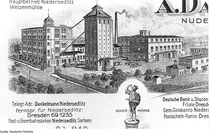 Original image description from the Deutsche FotothekDresden-Niedersedlitz. Weizenmühle Dankelmann, Ausschnitt aus: Briefkopf eines Geschäftsbriefes (urspr. Wassermühle (Mühlenstraße 107) 1873 zur Dampfmühle ausgebaut)